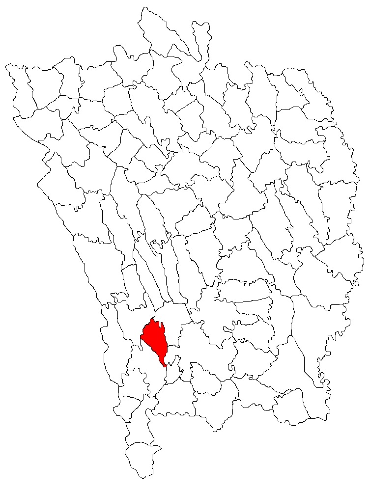 Categorie:Hărţi ale judeţului Vaslui